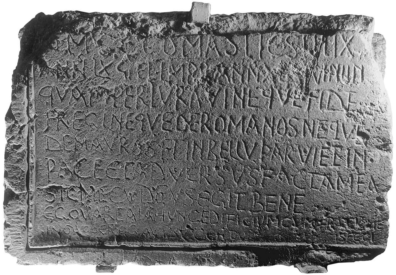 « Inscription de Masties », trouvée à Arris (AE, 1945, no 97). Musée nationale des antiquités d’Alger, Algérie (cliché Centre Camille Jullian).